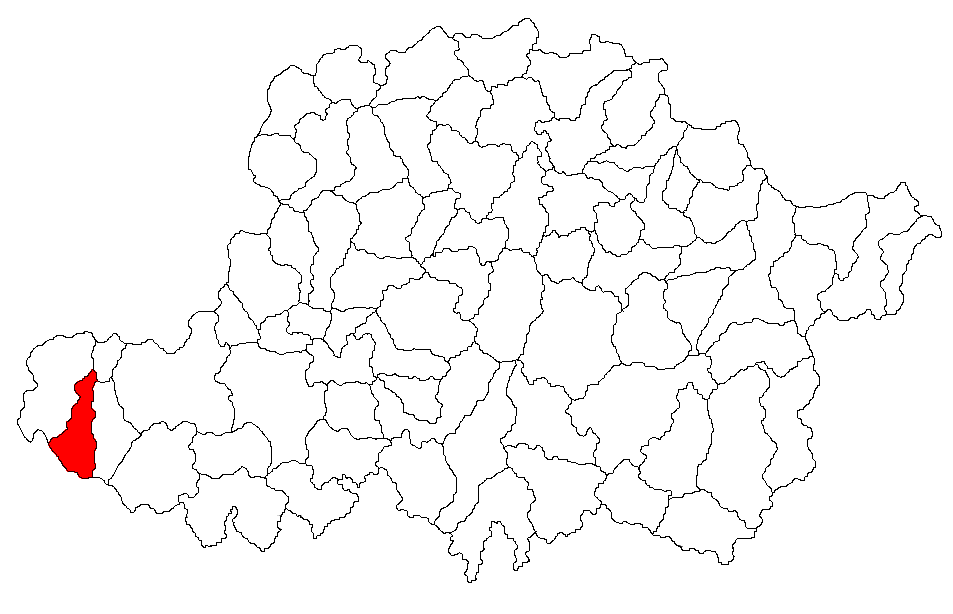 Categorie:Hărţi ale judeţului Arad